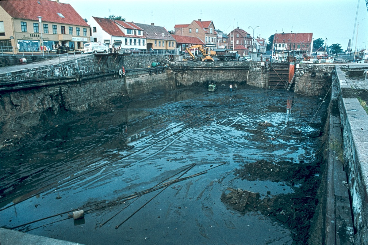 Der leergepumpte Innenhafen von Allinge / Bornholm, 1979